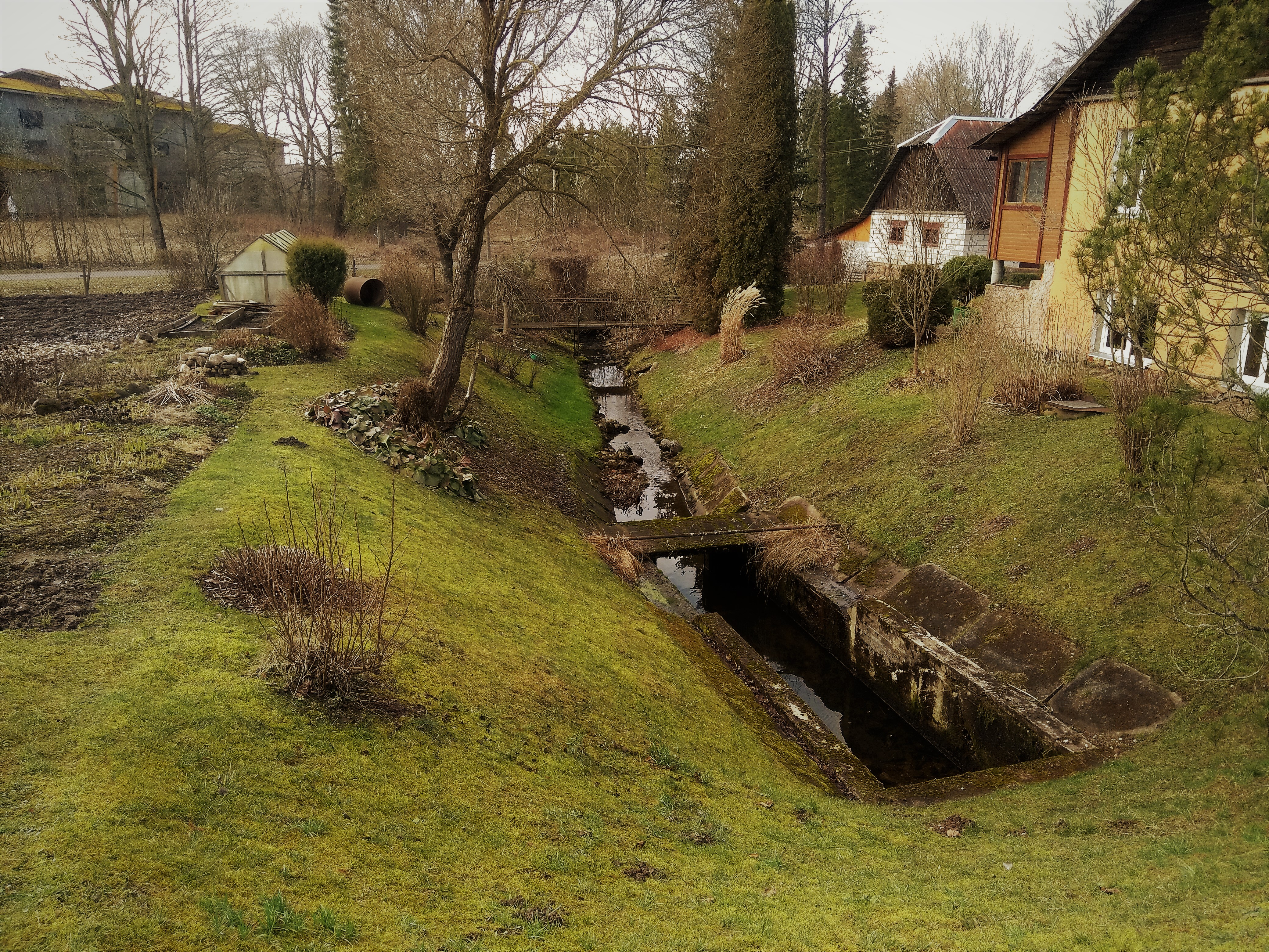 Linnuseala loodenurgast kunagise veskitammi asukoha alt voolab lääne suunas välja Konguta oja.